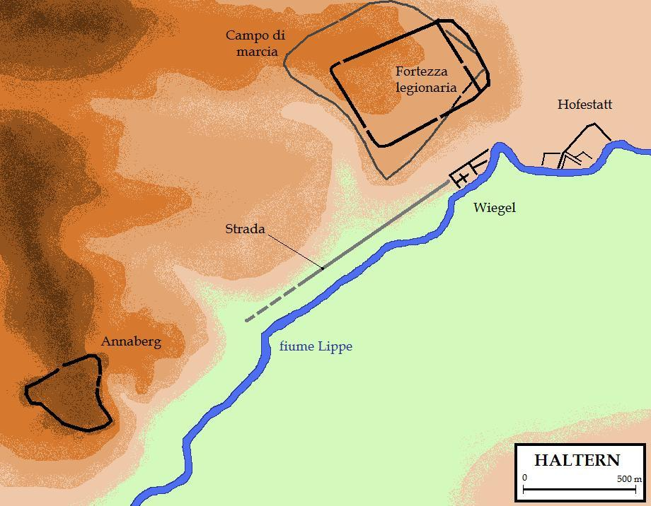 gli accampamenti romani nella zona di Haltern (11 a.C.-9 d.C.)